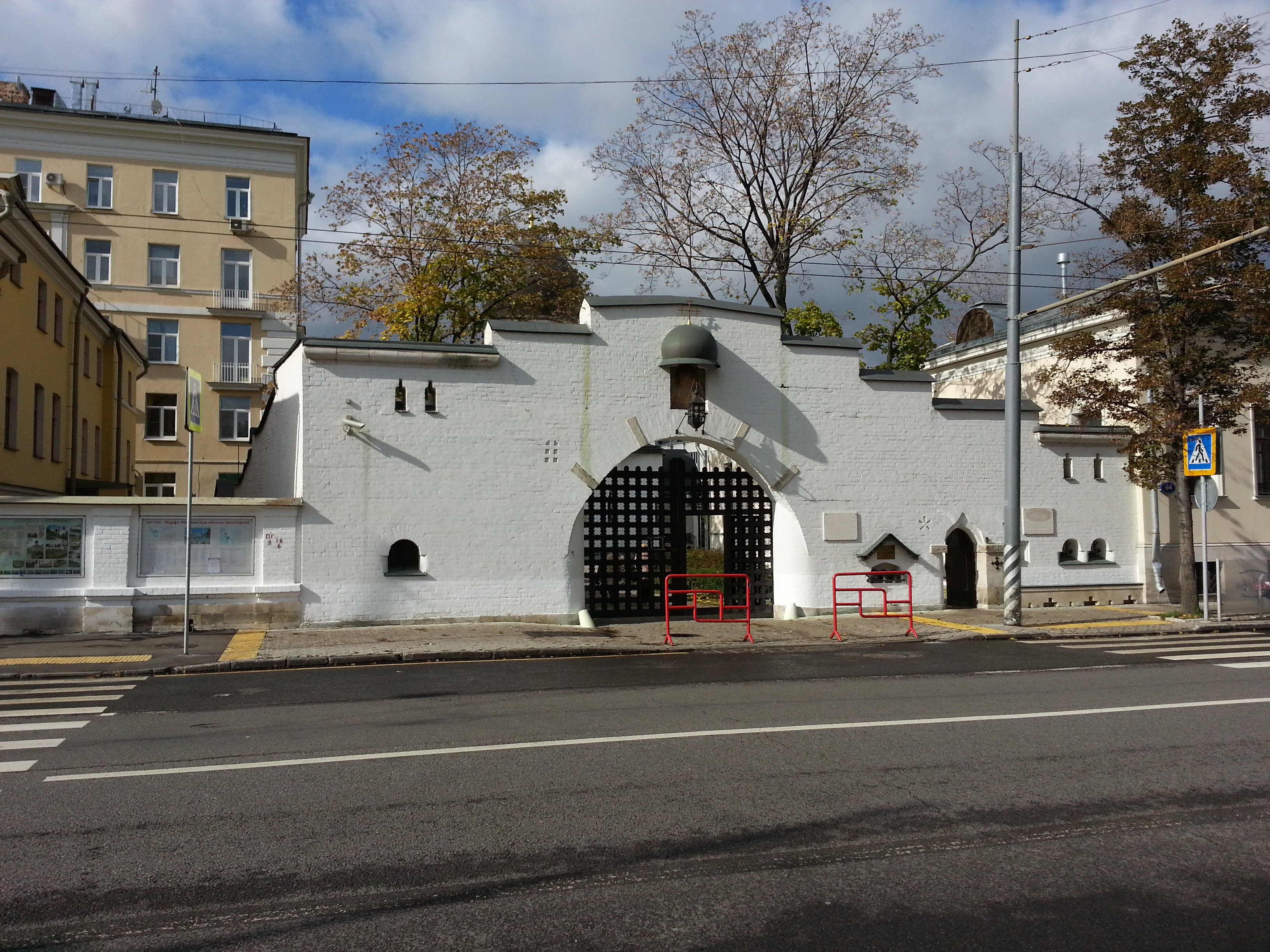 Марфо-Мариинская обитель сестер милосердия (Москва и Московская область, Москва, Большая Ордынка улица, 34-34-а)